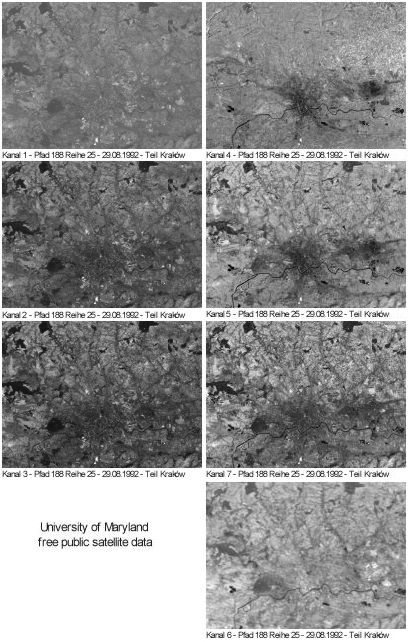 Spektralkanäle des TM